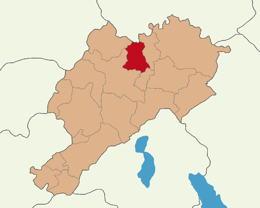 İscehisar ilçesini konumu